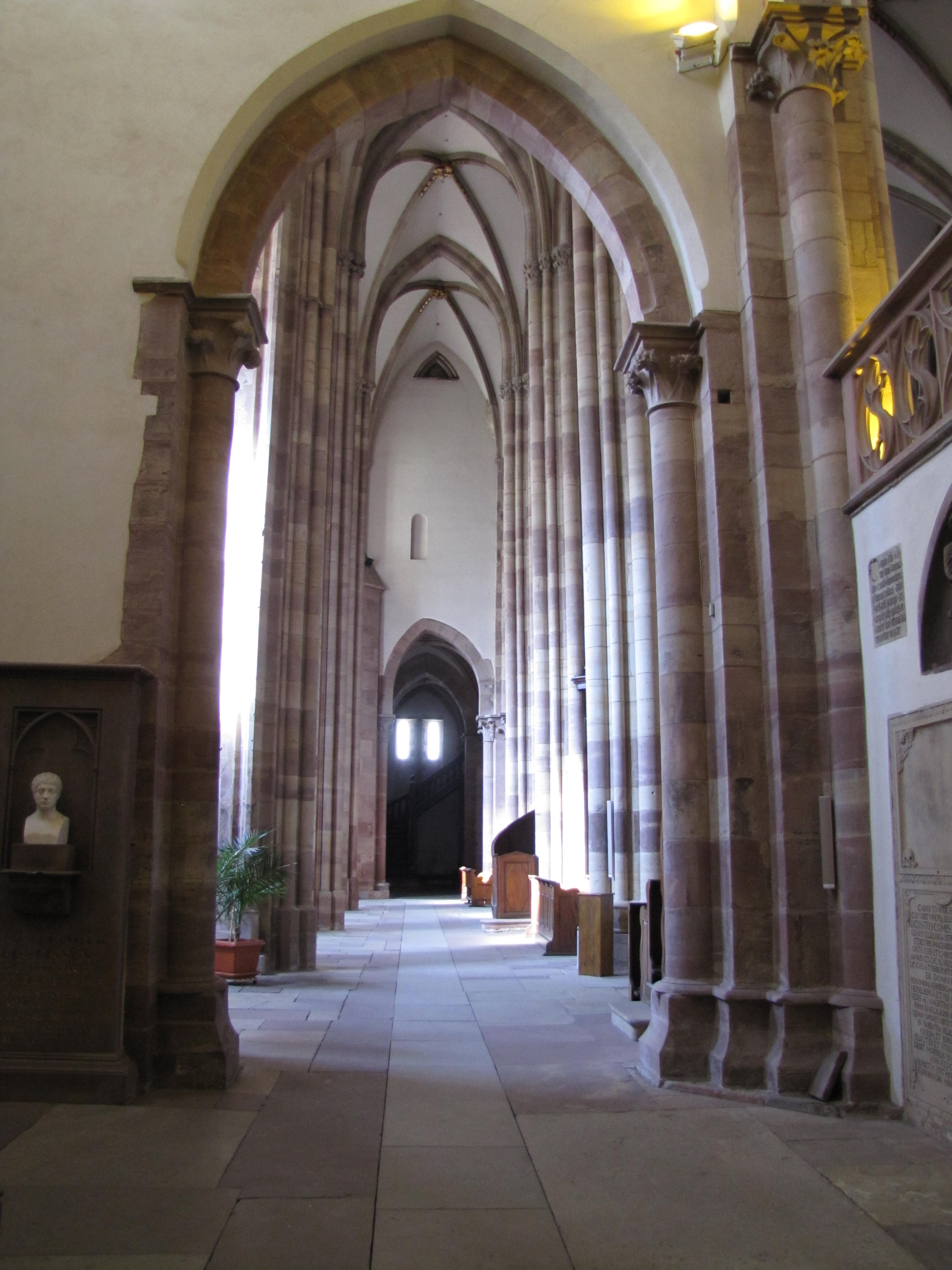 Alsace, Bas-Rhin, Église protestante Saint-Thomas de Strasbourg, 4 rue Martin-Luther (PA00085032). Bas-côté sud, église-halle (Hallenkirche)